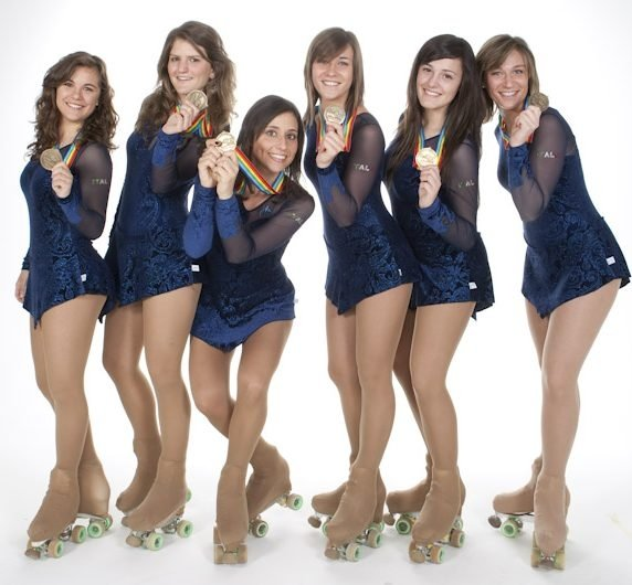 Pattinaggio artistico a rotelle - Gruppi spettacolo- Grandi gruppi -Campionesse del mondo 2008